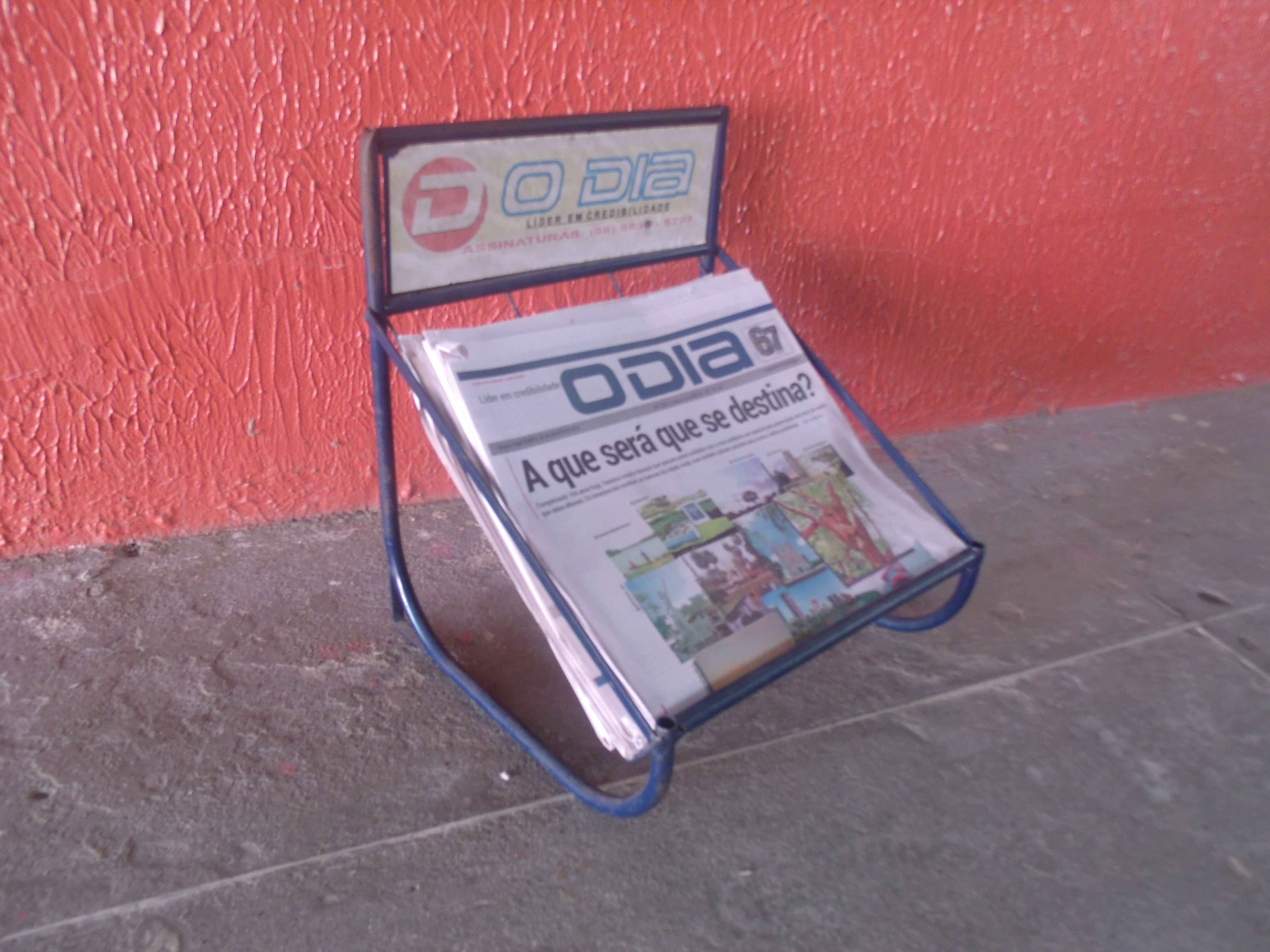 Banquinha de Jornal feita em metal.